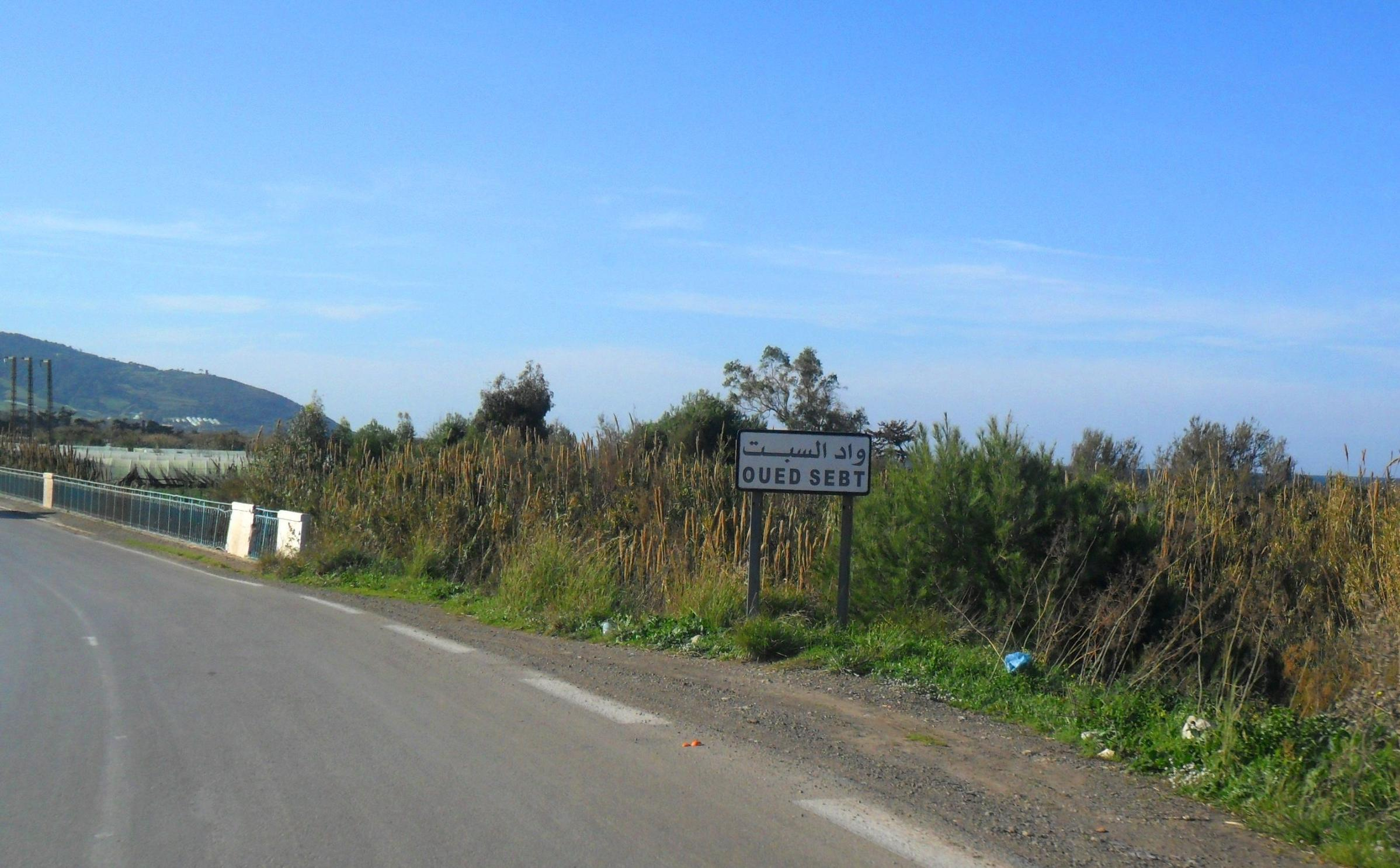 Oued Sebt واد السبت